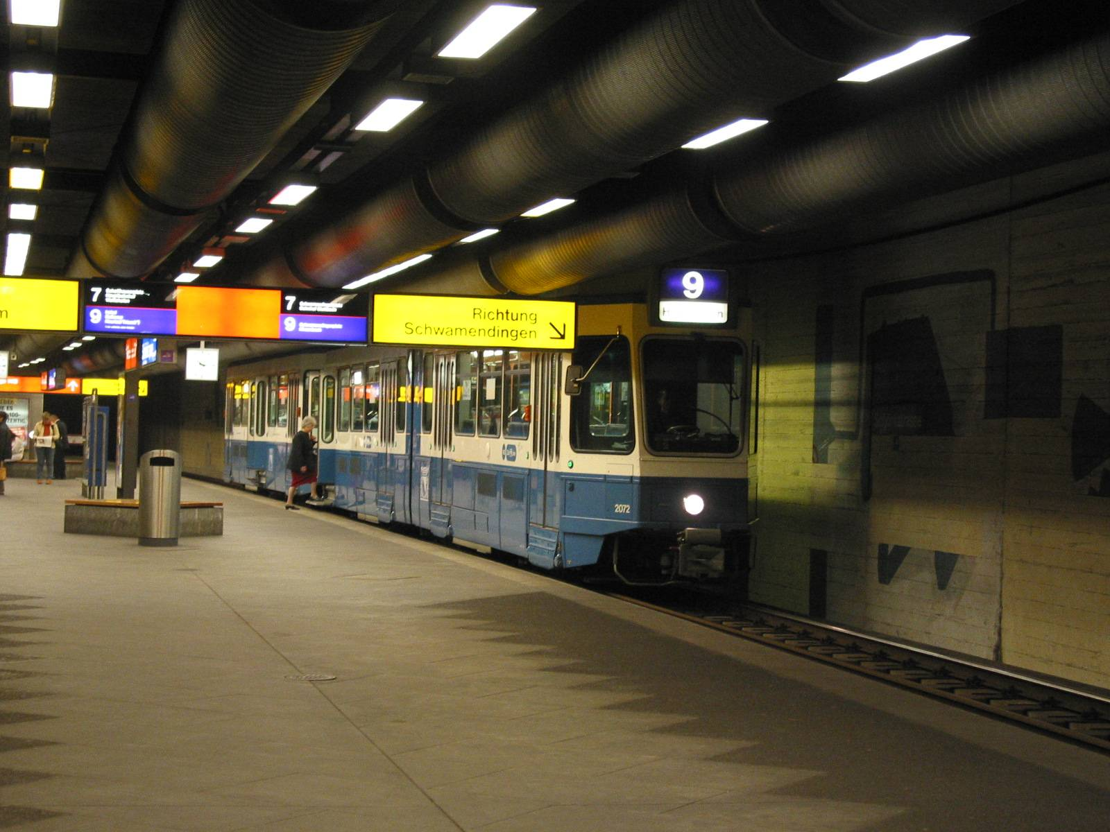 de: Zürich Tramstation Schörlistraße en: Zurich tramstation Schörlistraße